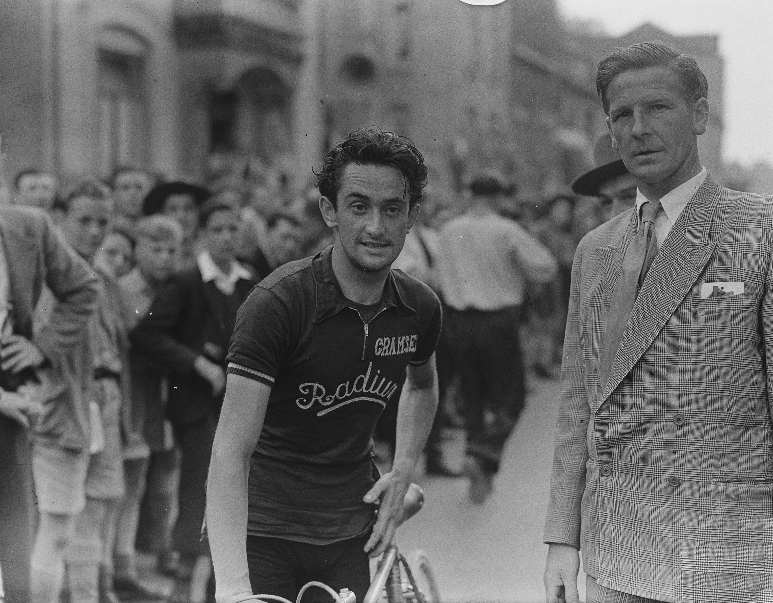 Collectie / Archief : Fotocollectie Anefo Reportage / Serie : [ onbekend ] Beschrijving : Professionals wegkampioenschap te Valkenburg Hans Dekkers Datum : 17 juni 1951 Locatie : Limburg, Valkenburg Trefwoorden : Professionals, wielrenners Persoonsnaam : Hans Dekkers Fotograaf : Pot, Harry / Anefo Auteursrechthebbende : Nationaal Archief Materiaalsoort : Glasnegatief Nummer archiefinventaris : bekijk toegang 2.24.01.09 Bestanddeelnummer : 904-6248